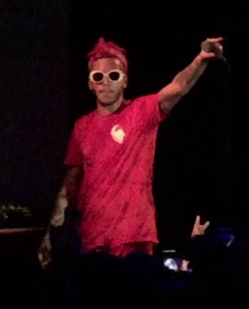 Sfera Ebbasta in concerto nel 2016